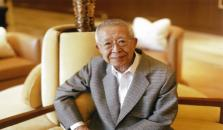 Masakazu Yamazaki